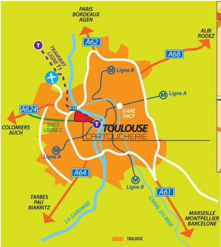 Plan de la plaquette de présentation d'OPPIDEA 2015